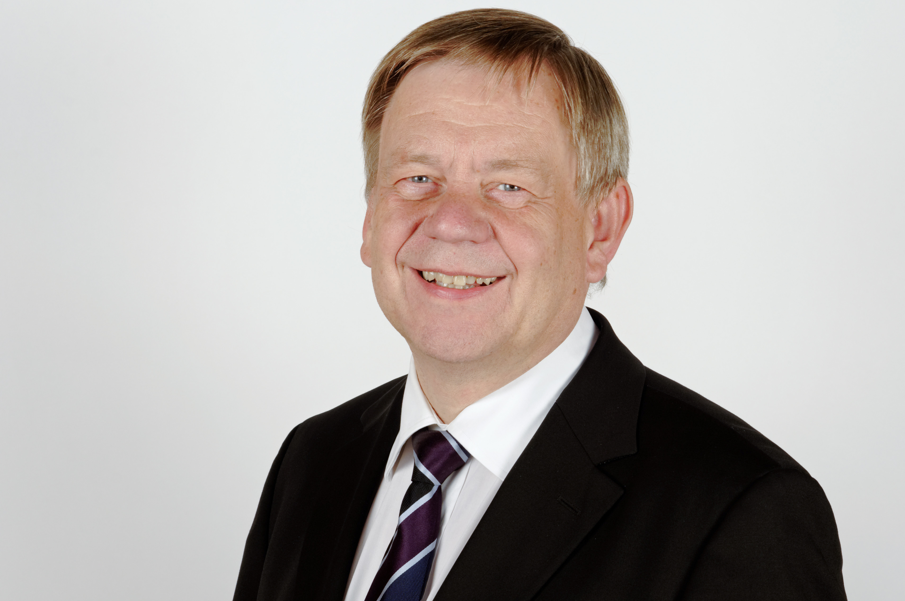 Landtagsprojekt Bayern